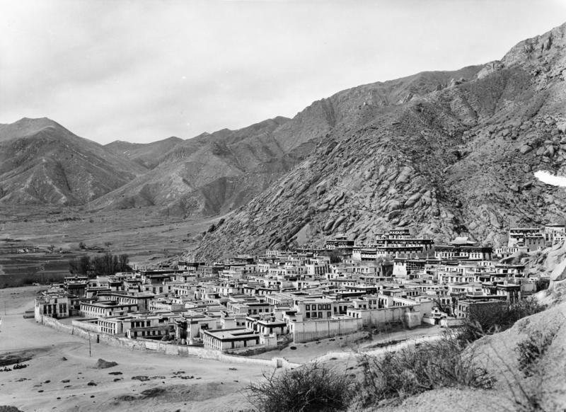 Tibetexpedition, Blick auf Kloster Sera Lhasa, Kloster Sera